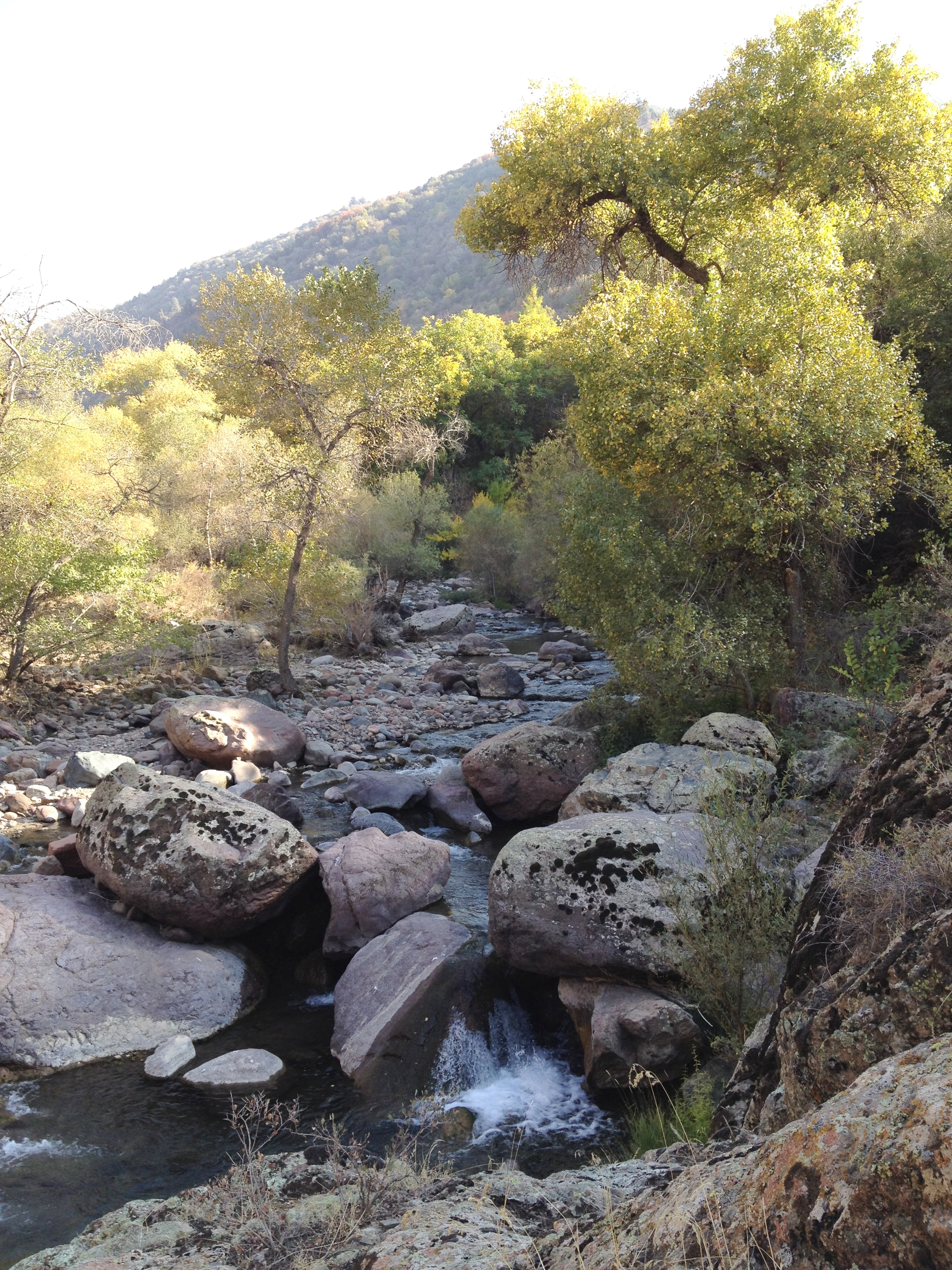 Башкызылсайский участок Чаткальского заповедника